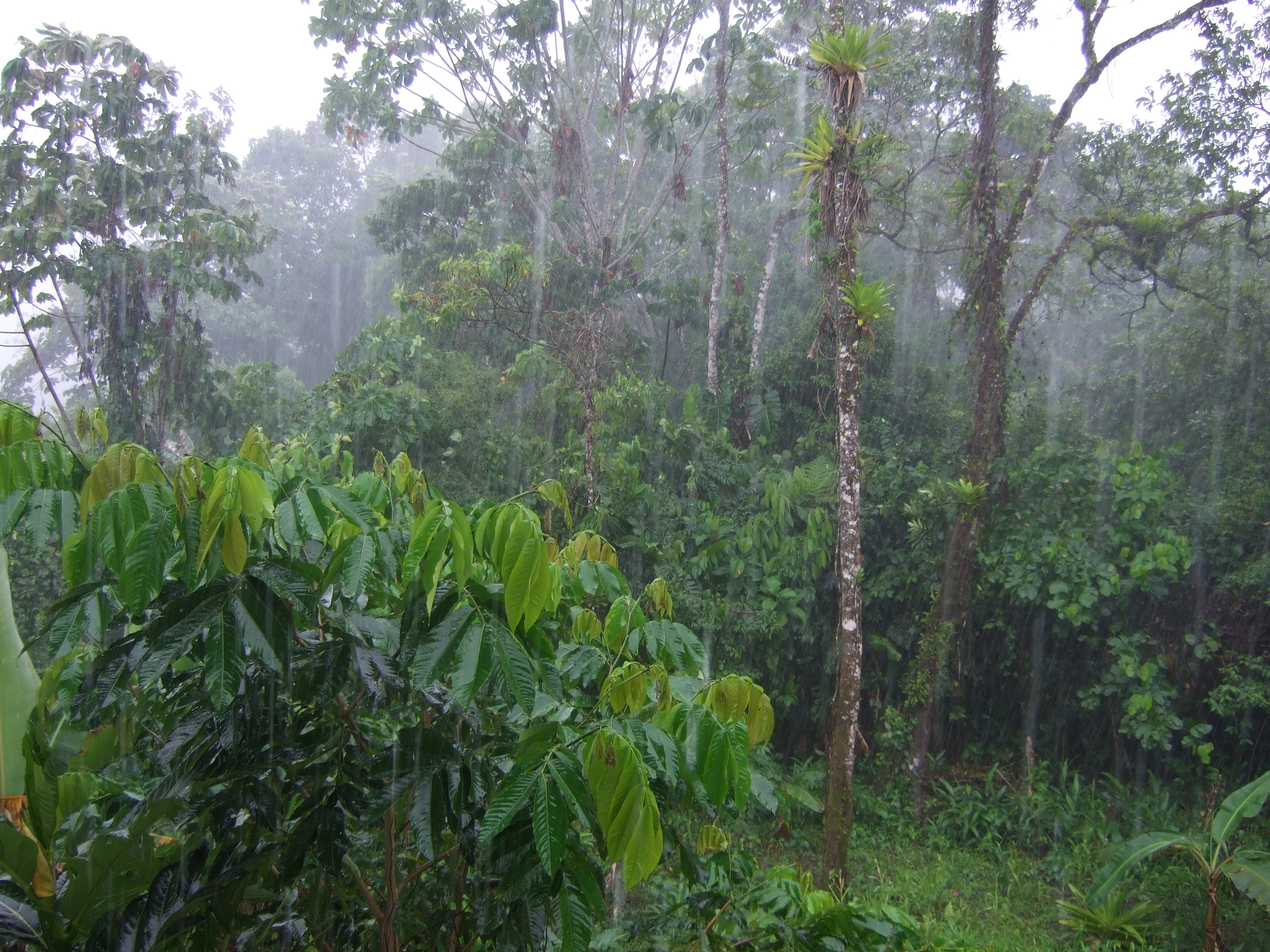 Tena, Ecuador